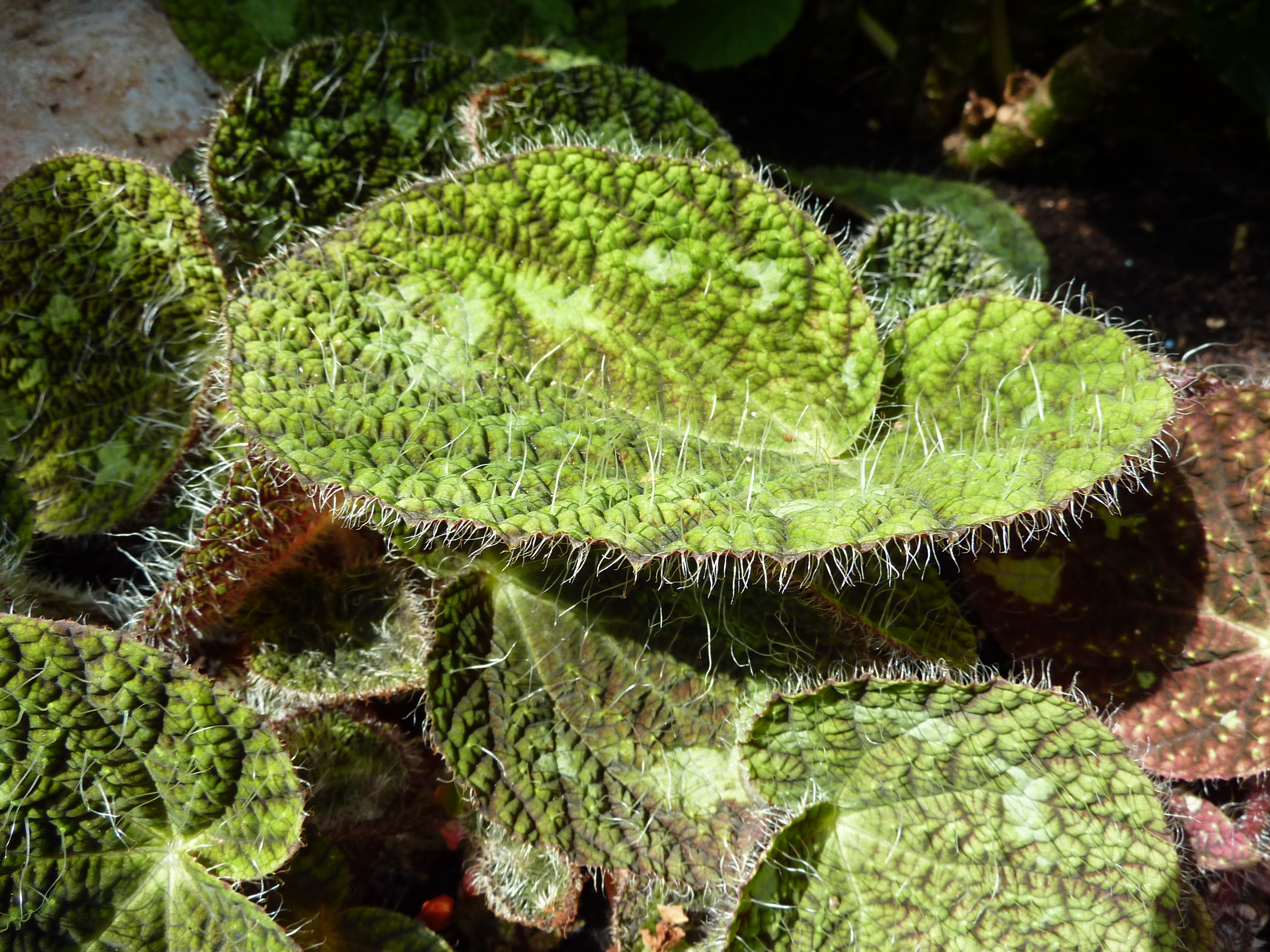 Begonia sizemorae, serres chaudes dAuteuil - Jardin botanique de la Ville de Paris - France